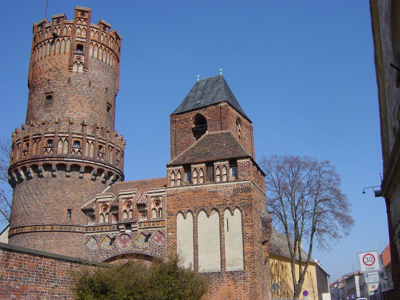 Tangermünde, Neustädter Tor, erbaut 1300 bis 1450, Wappen über der Tordurchfahrt (aufgemalt 1897): Preußischer Königsadler, Reichsadler des Bismarckreiches mit dem aufgelegten Hohenzollernschild,Tangermünder Adler, Adler des Heiligen Römischen Reiches Deutscher Nation, Brandenburgischer Adler photo taken by Mazbln on April 2, 2005